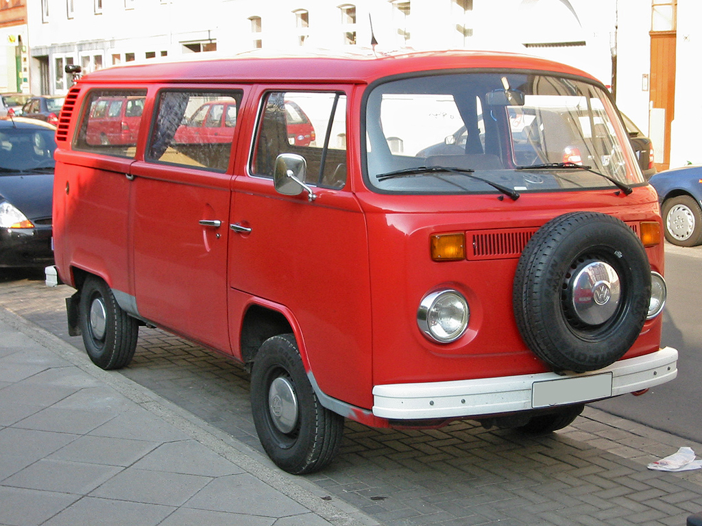 VW Transporter, T2b